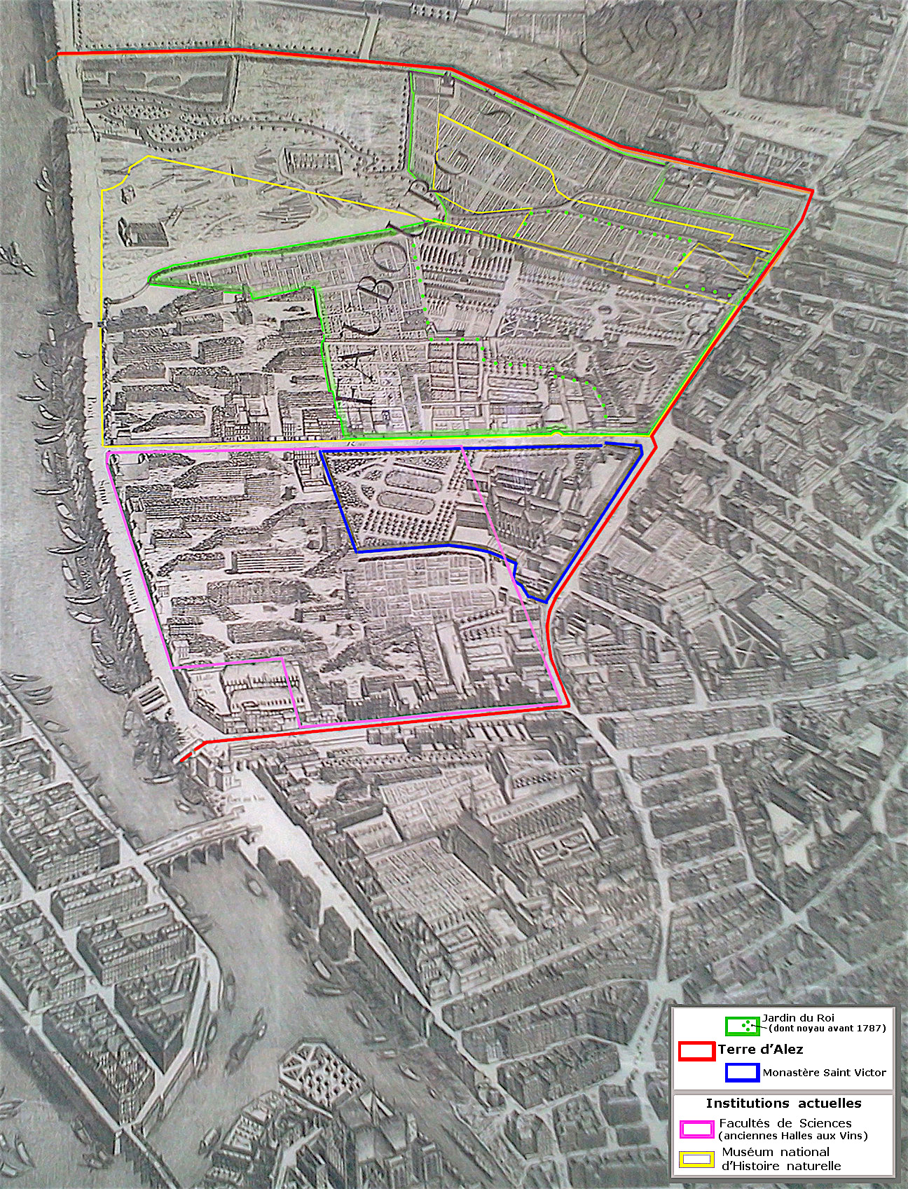 La Terre d'Alez à Paris ; fond de carte (background) PD-old (plan Turgot, reproduction du XIXe siècle).